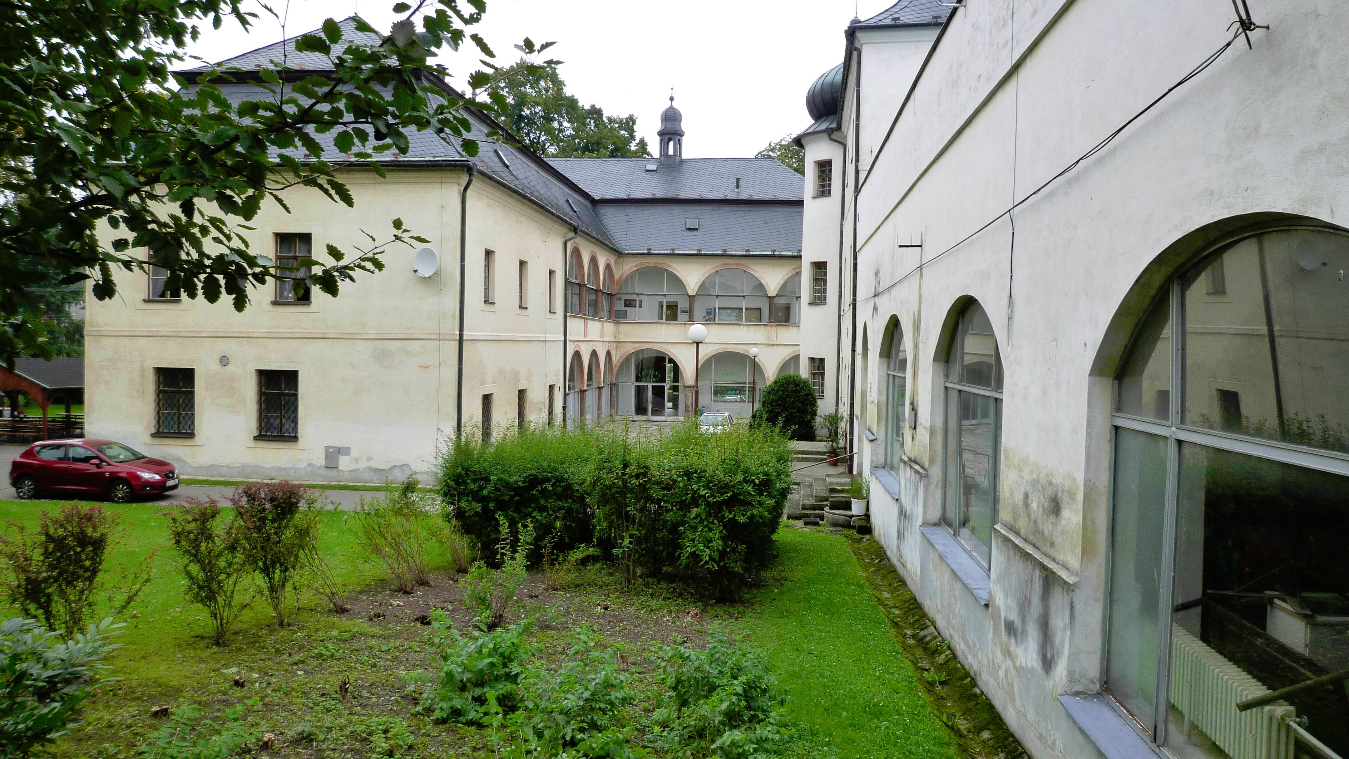 Leitersdorf - Altes Schloss, Foto von Fam. Mayerh. 2010